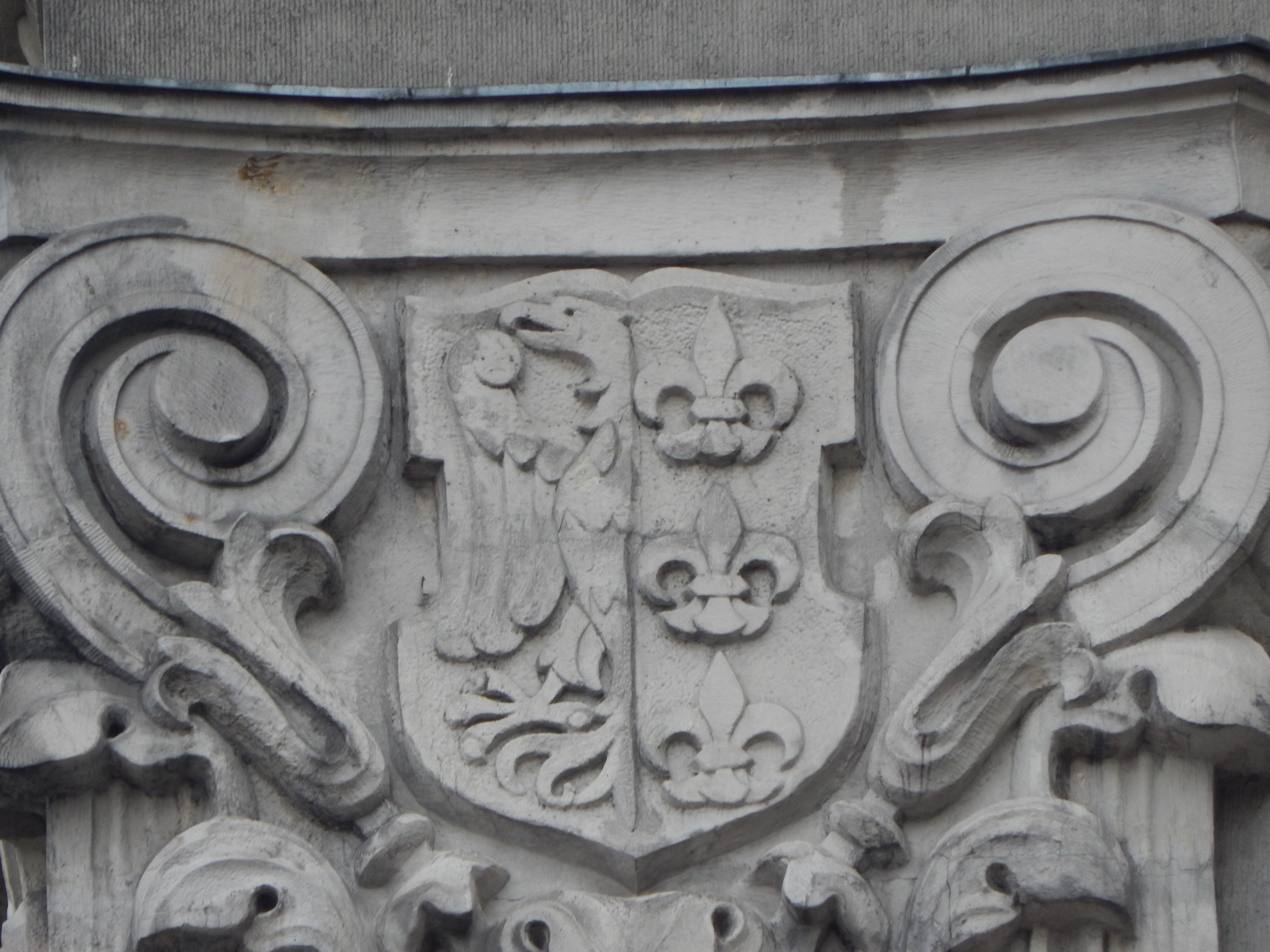 Fragment elewacji gmachu Sejmu Śląskiego - herb Bielska